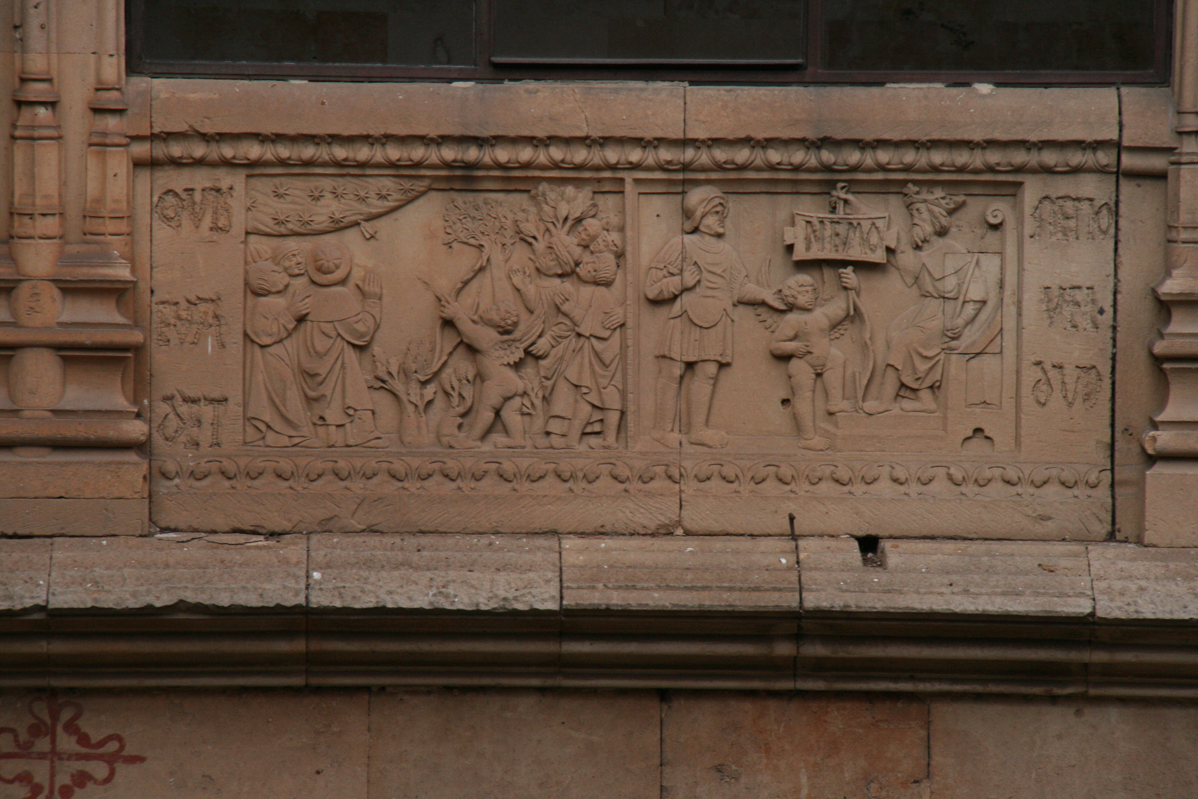 QUIS EVADIT NEMO VEL DUO